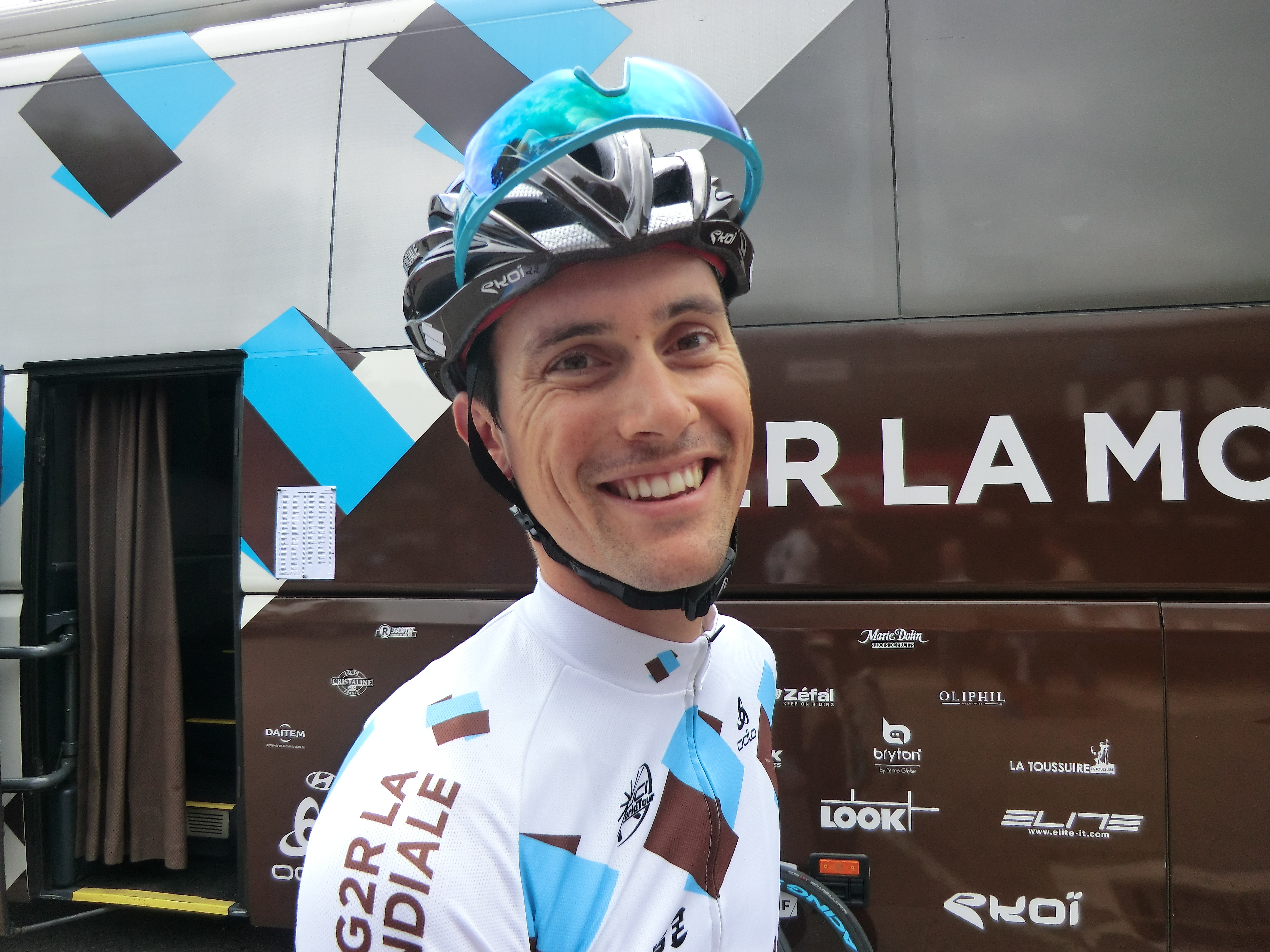 Guillaume Bonnafond à Trévoux avant le prologue du Tour de l'Ain 2013.